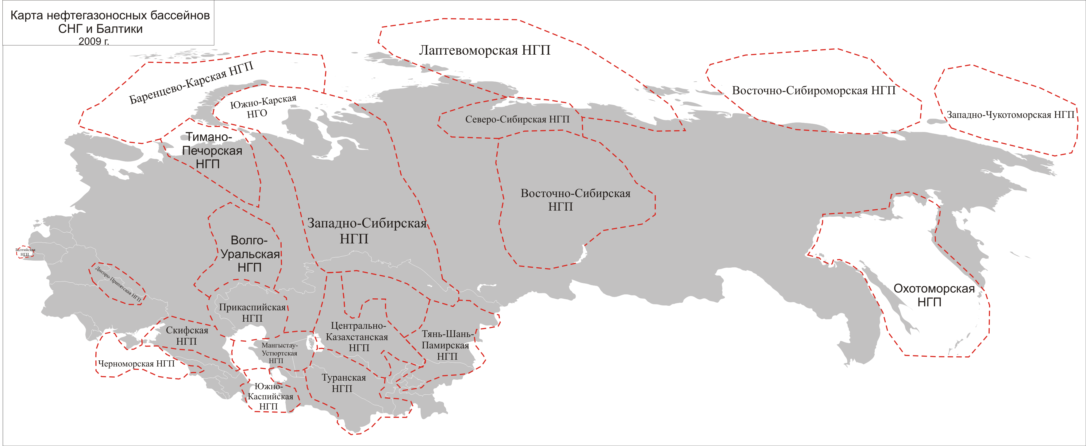 Карта расположение НГП стран СНГ и Балтики